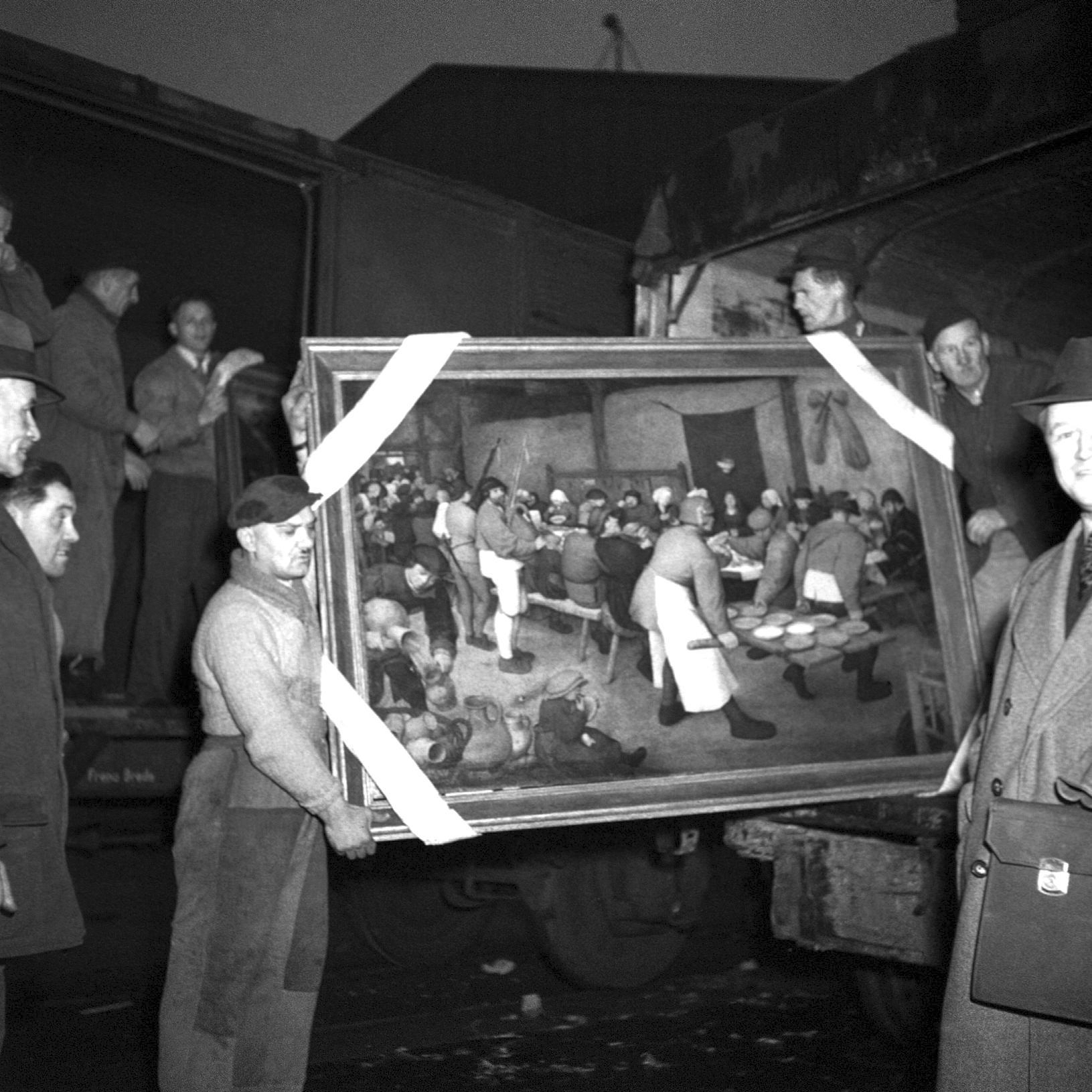 Pieter Bruegels Gemälde Die Bauernhochzeit wird aus dem Salzburgischen zurück nach Wien gebracht